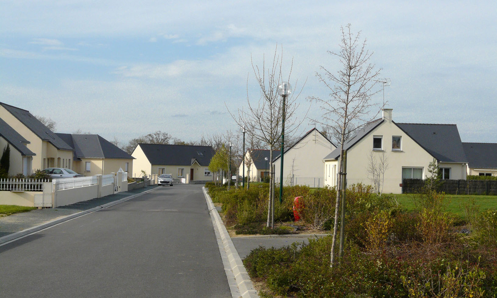 Rue des donjons, Mésanger (44)